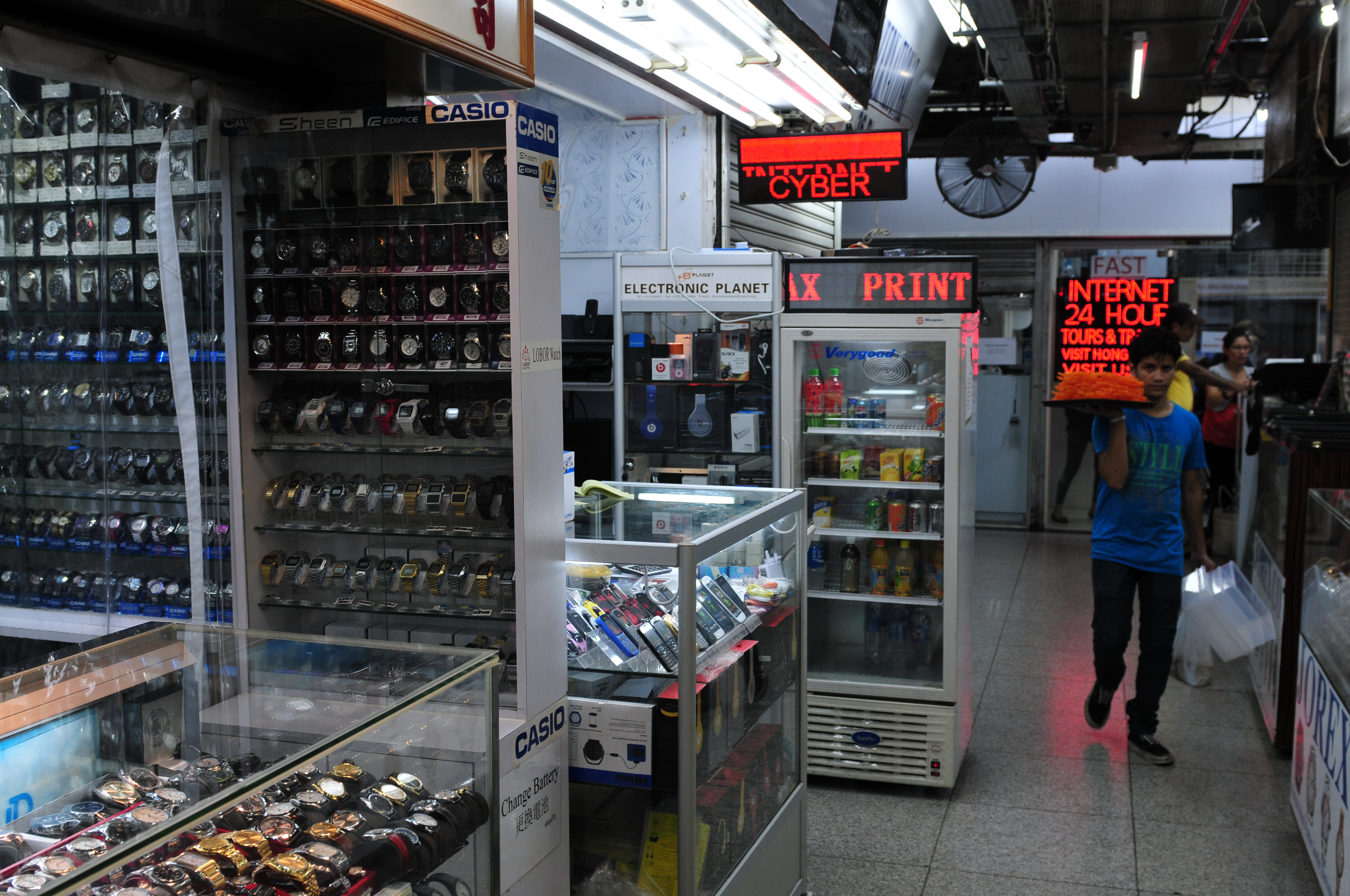 Wikimania 2013 Hongkong